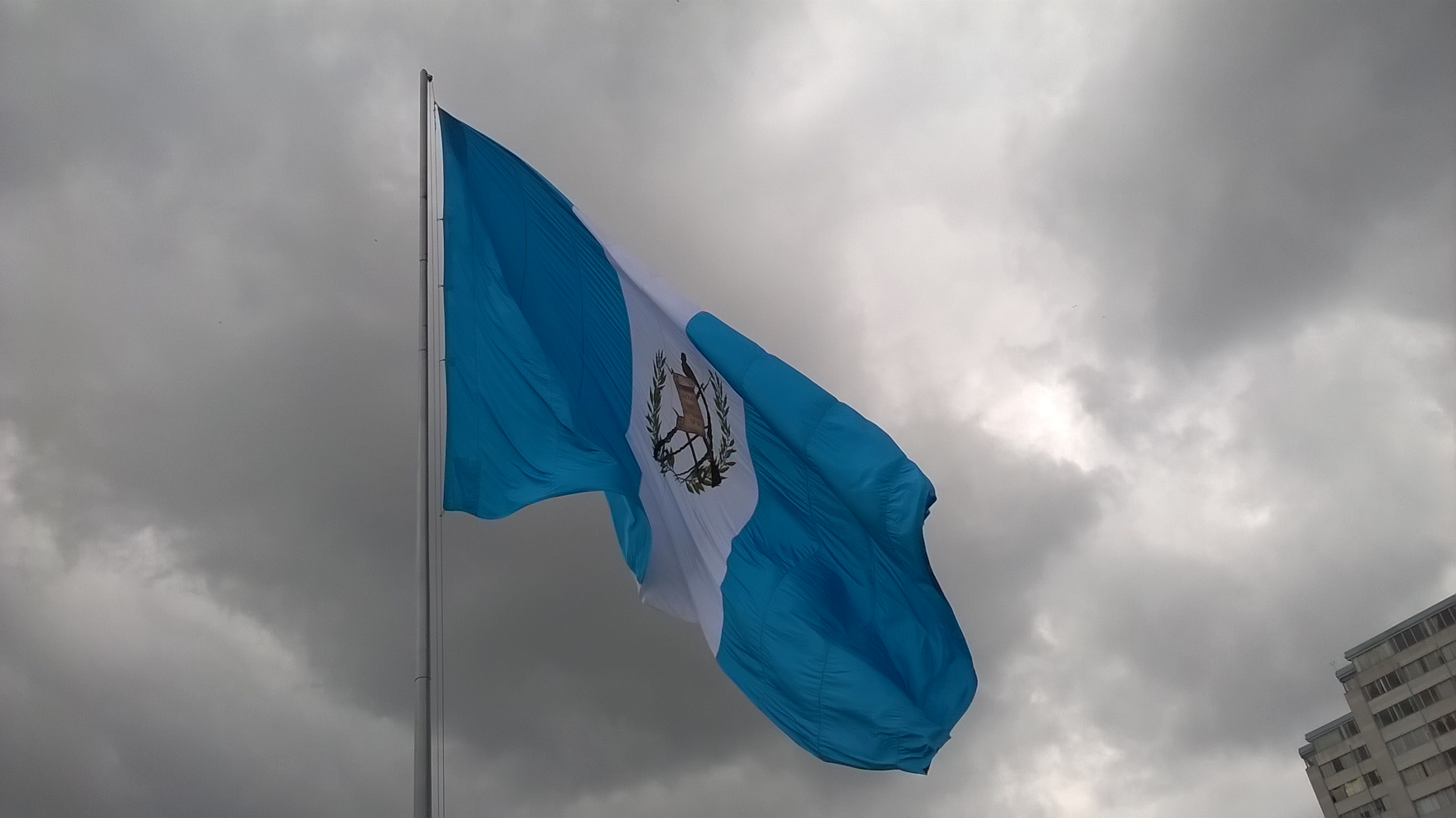 Bandera de Guatemala cerca del famoso Palacio Nacional en el día de la Independencia.